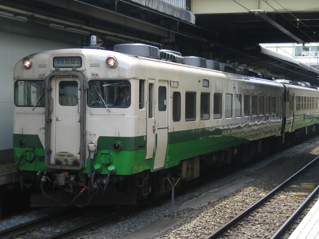 東北地域本社色 キハ28 仙台駅 ＪＲ東日本